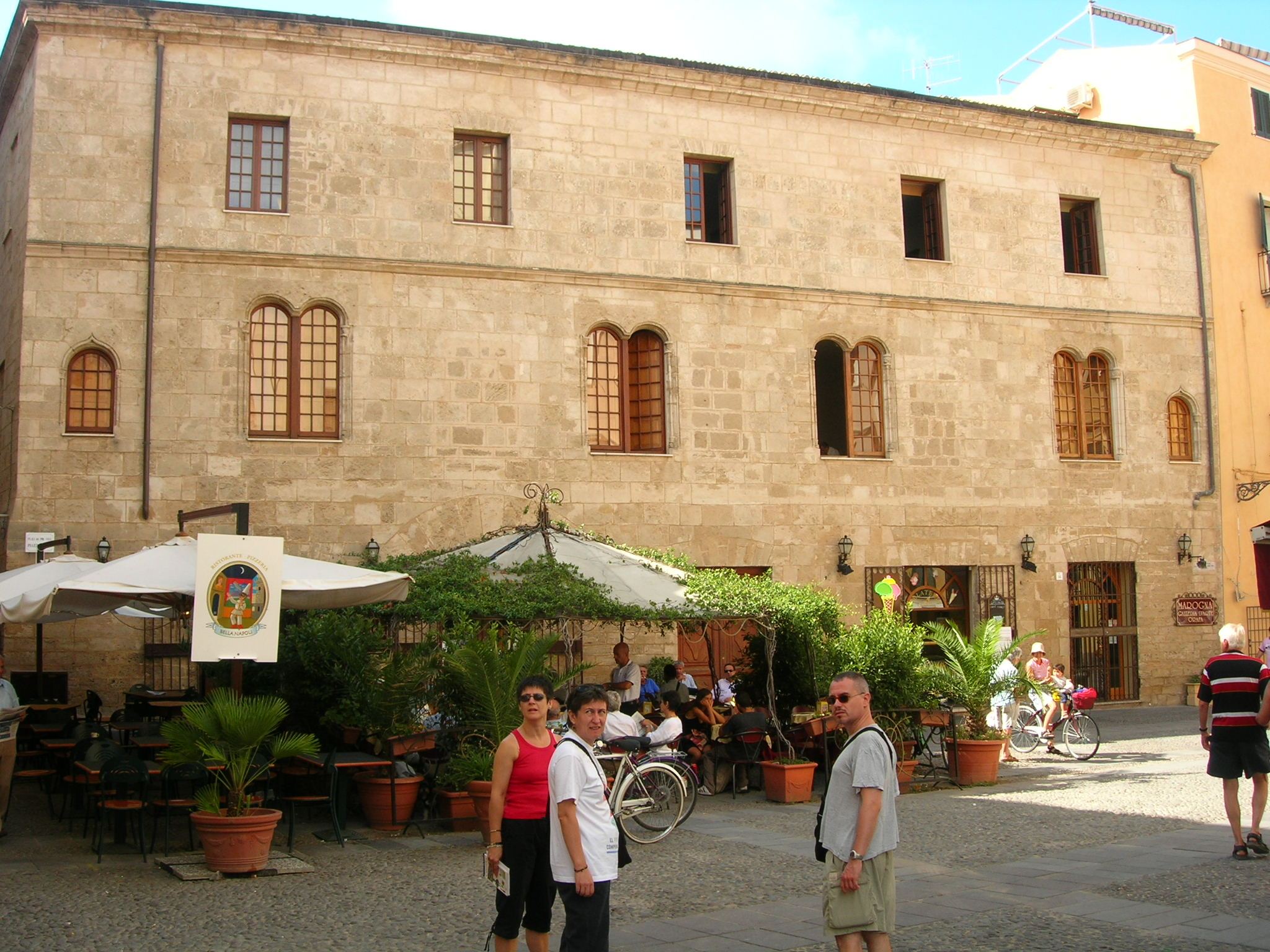 Description